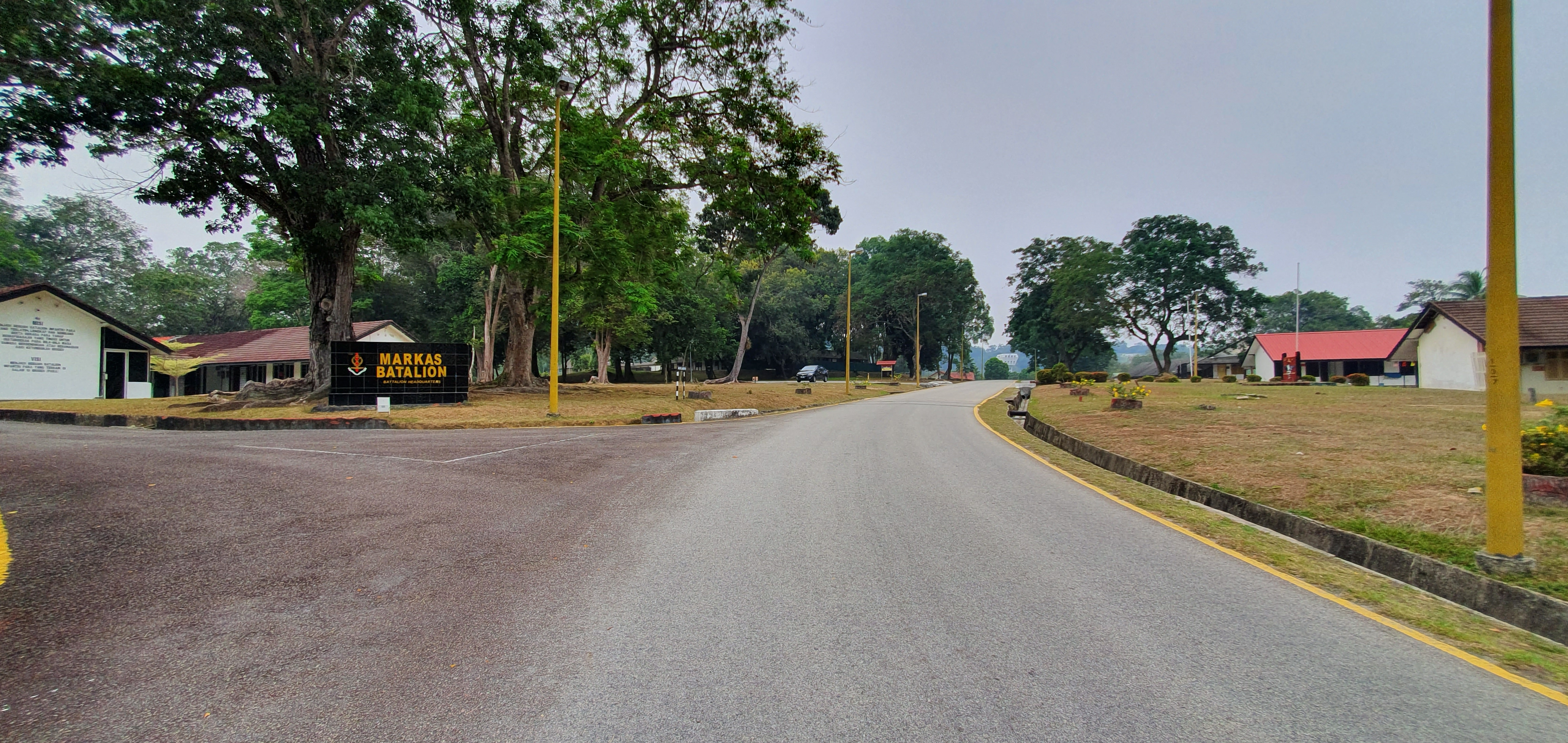 Jalan menuju ke Bn Hq